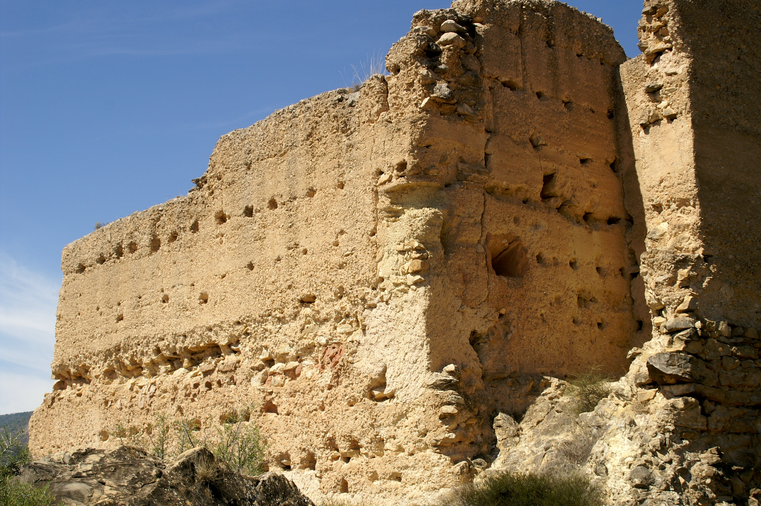 Mur i torre del castell de Relleu (Relleu, la Marina Baixa, País Valencià)